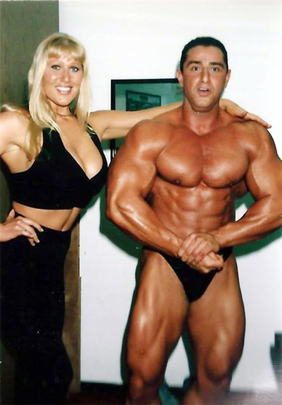 אלי האנה ומשתתפת בתחרות כושר בארצות הברית